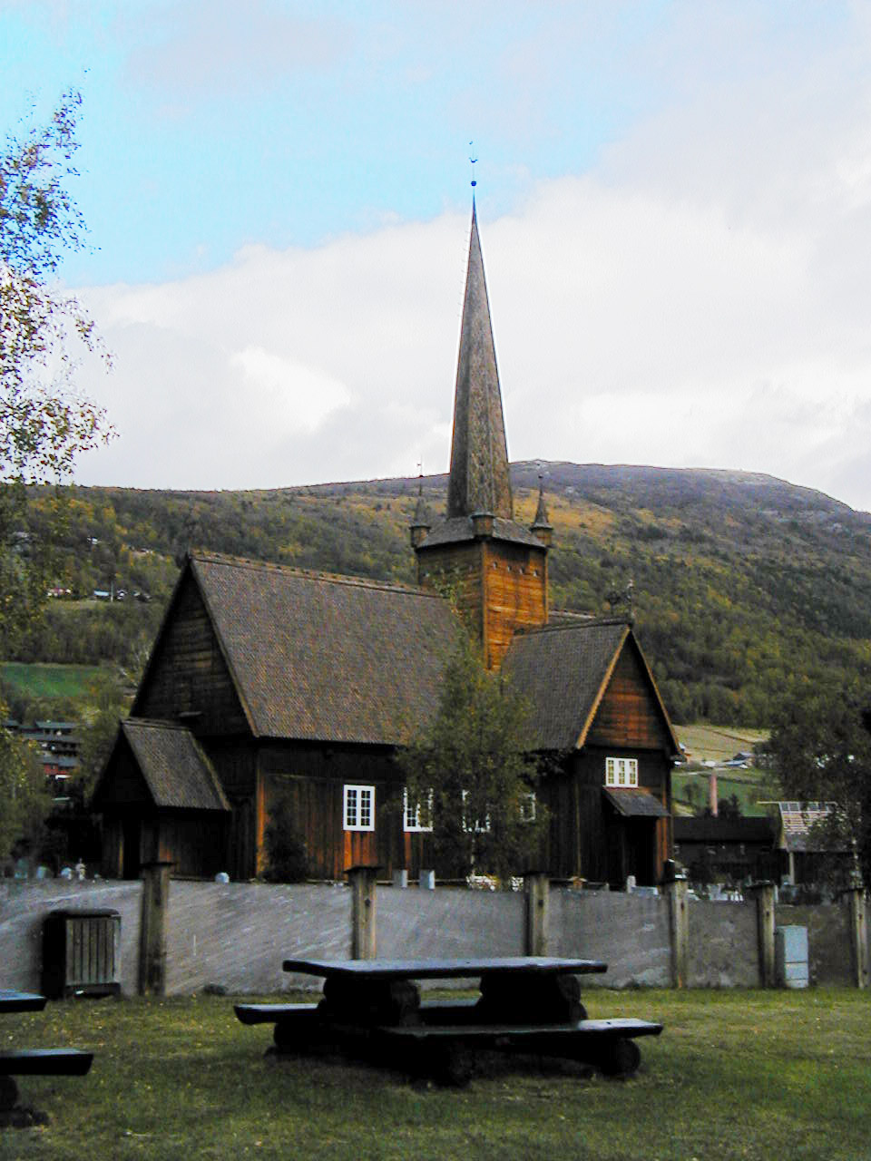 no: Vågå kyrkje en: Vågå church